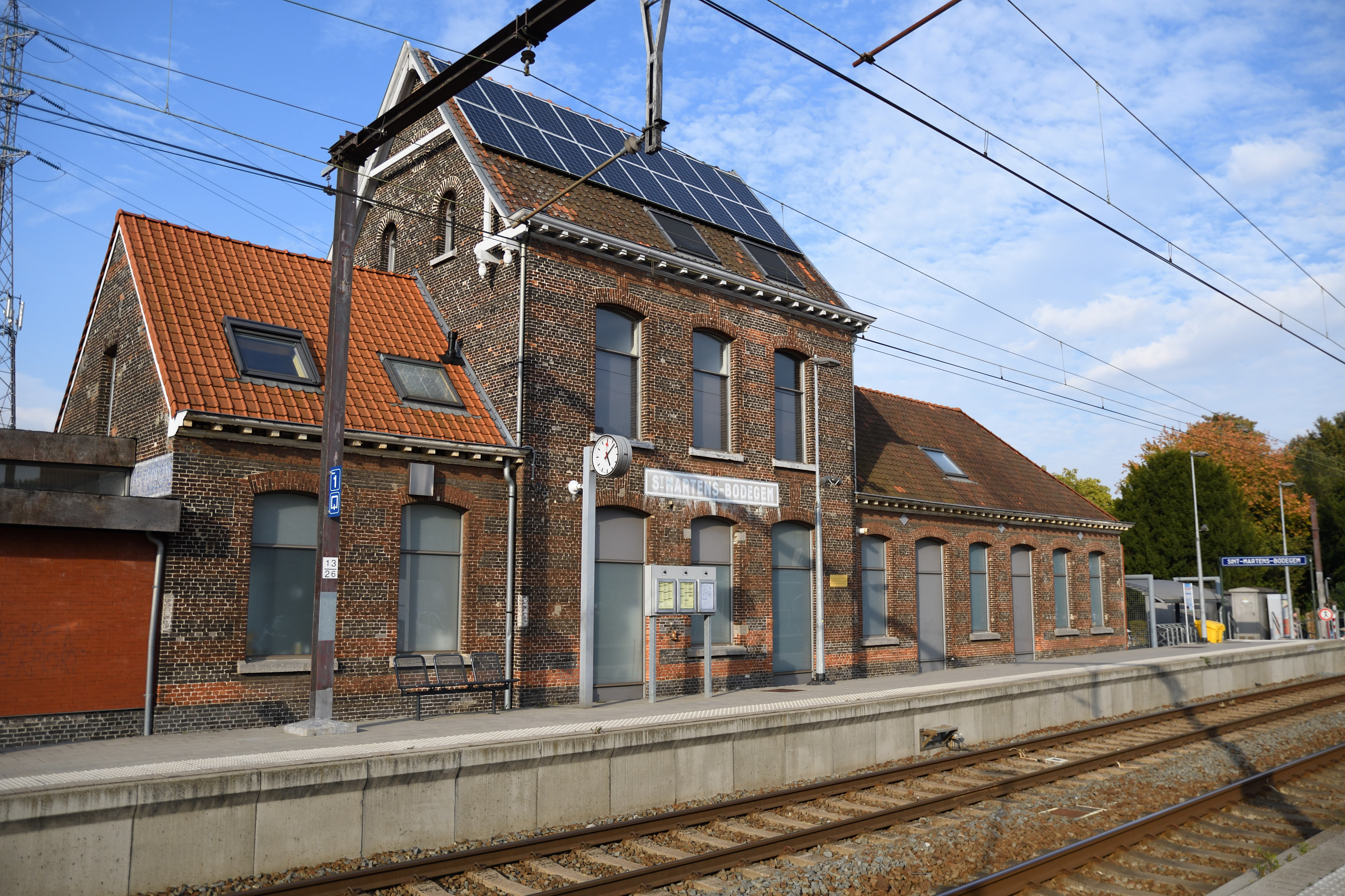 Station St. Martens Bodegem. This photo of immovable heritage has been taken in the Flemish Region